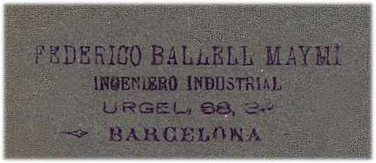 Indirizzo del fotografo ingeniero industrial Federico Ballell Maymi, Urgell 68/3 Barcelona, apposto sul cartoncino di supporto della fotografia scattata il 12 aprile 1913 nello studio della "American Clinica" di Juan Garcia-Bravo in Ronda S. Antonio, 102 e pubblicata su "Mundo Grafico" del 30 aprile dello stesso anno.